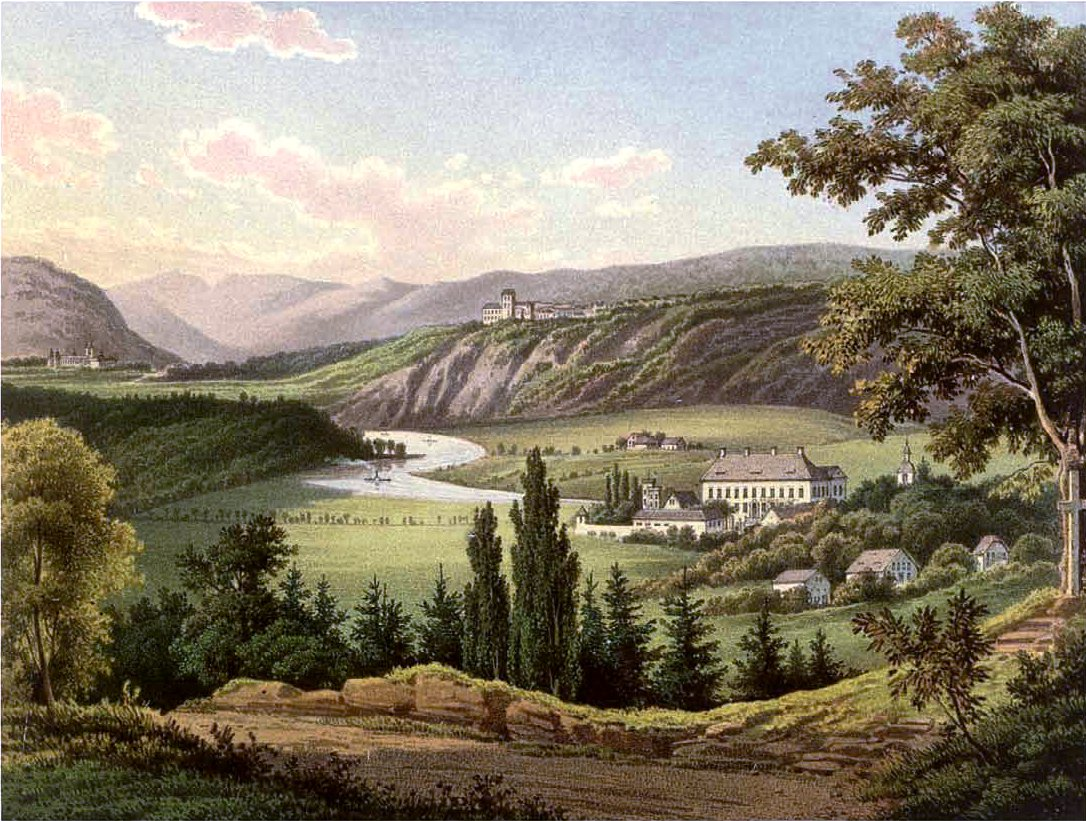 Schloss Wehrden, Lithografie aus dem 19. Jahrhundert